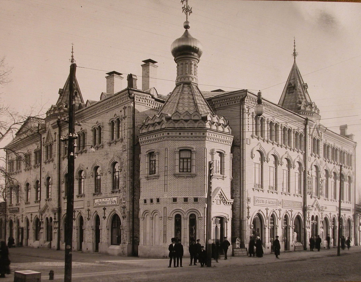 Чернігівський будинок Миколаївського єпархіального братства